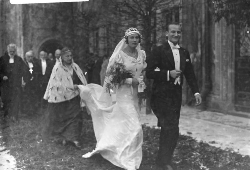 Der Fürst heiratet eine Bürgerstochter! Die seltene Hochzeit eines Fürsten mit einer Bürgerstochter fand in Stolberg im Harz statt. Der 29 jährige Fürst Wolff Heinrich Stolberg zu Stolberg Schlossherr von Stolberg im Harz, der ursprünglich die Kronprinzessin Juliana von Holland heiraten und holländischer Prinzgemahl werden sollte, hat sich jetzt mit einer jungen Bürgerlichen, der Tochter eines mittleren Beamten, verheiratet. Die junge Dame, Irma Erfert mit Namen, kam vor ungefähr vier Jahren als Haustochter zum Stolberger Bürgermeister, wo der junge Fürst sich in sie verliebte. Das glückliche Brautpaar nach der Trauung vor der Schloßkapelle zu Stolberg. Die Brautmutter im Hermelinmantel trägt der glücklichen Tochter den Schleier.